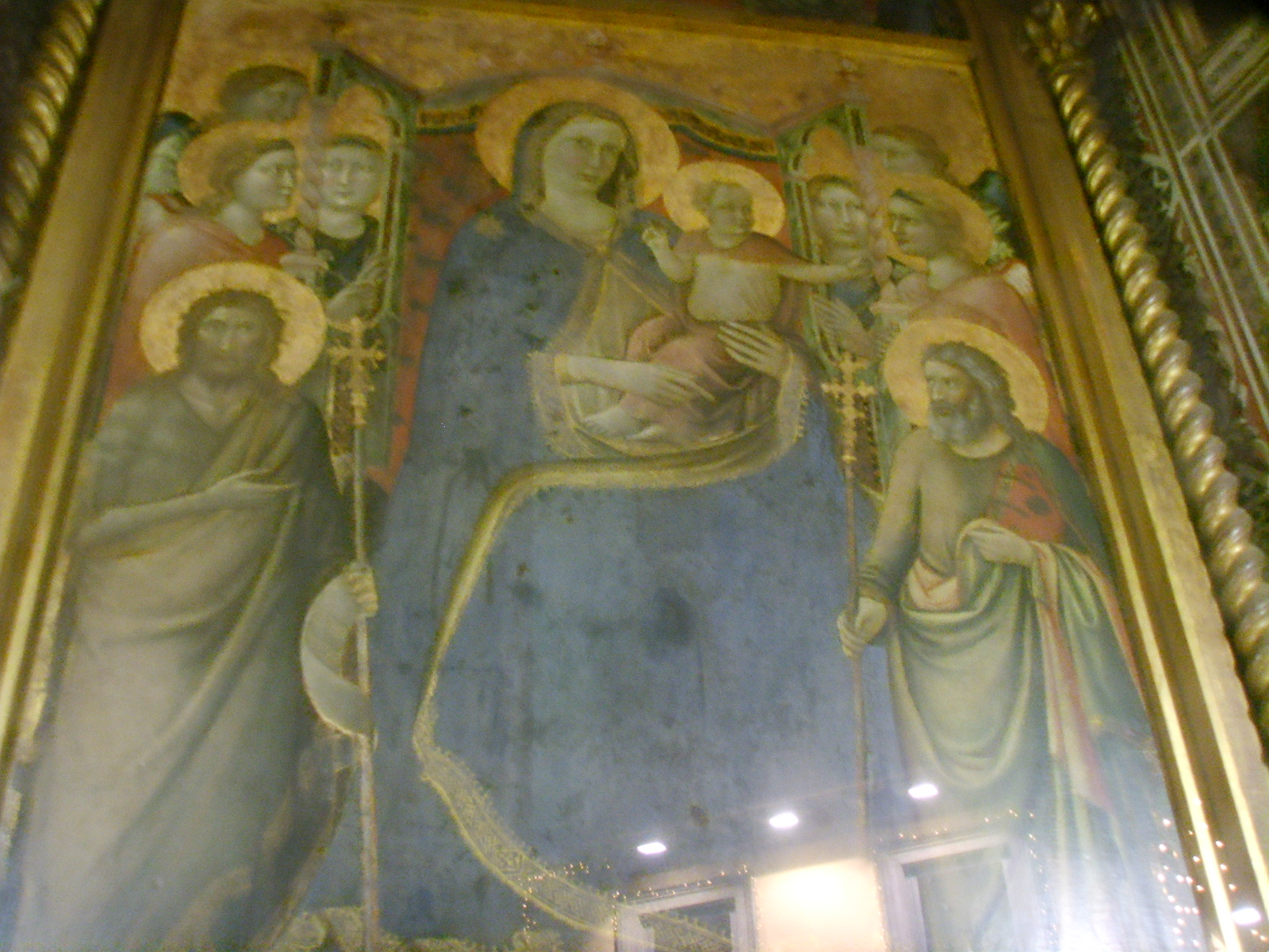 Tabernacolo_di_Santa_Maria_della_Tromba_-_Jacopo_di_Casentino in Florence, Italy